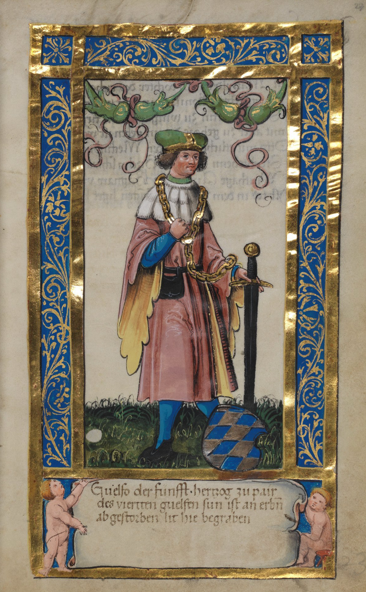 Weingartener Stifterbüchlein, Württembergische Landesbibliothek Stuttgart, Cod.hist.qt.584, fol. 27r, Stifterbild Herzog Welf V. Guelfo der fünfft hertzog zu pair des viertten guelfen sun ist an erben abgestorben lit hie begraben